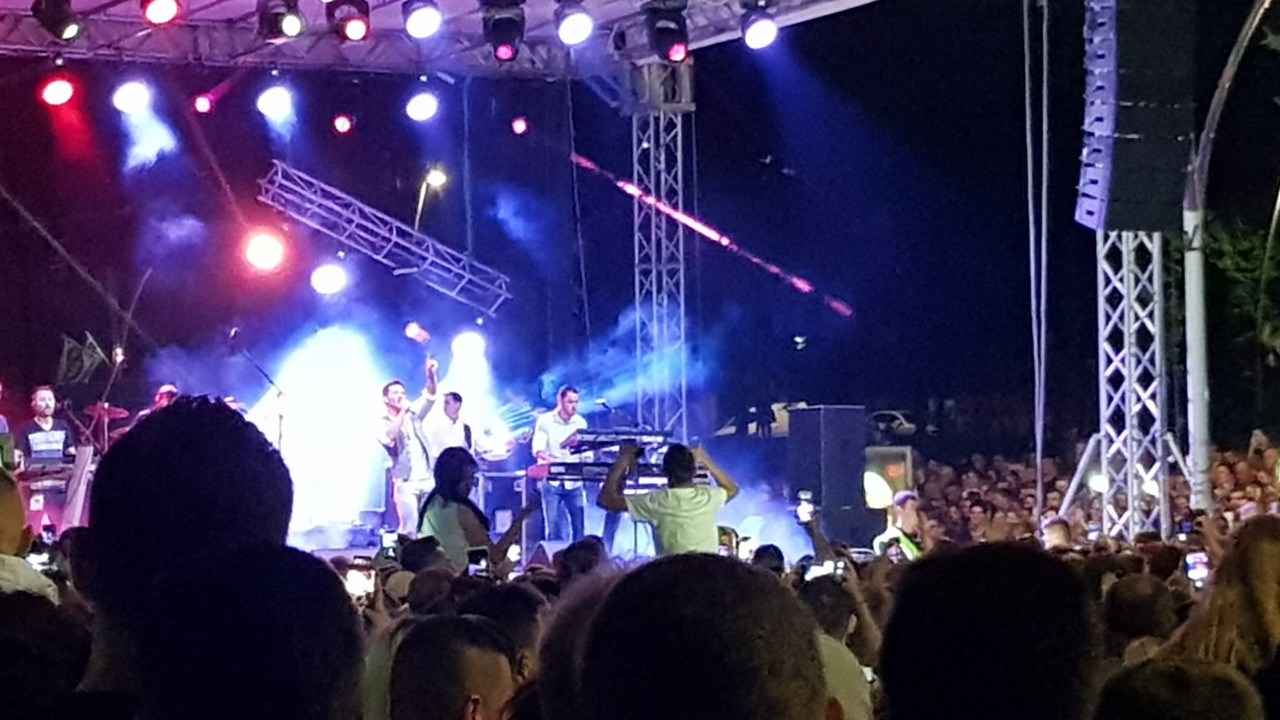 Saša Kovačević, Zenica summer fest 2019